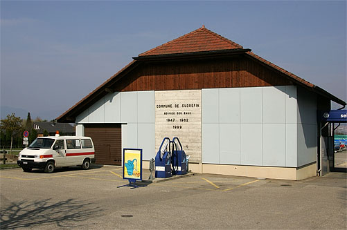 Cudrefin: service des eaux